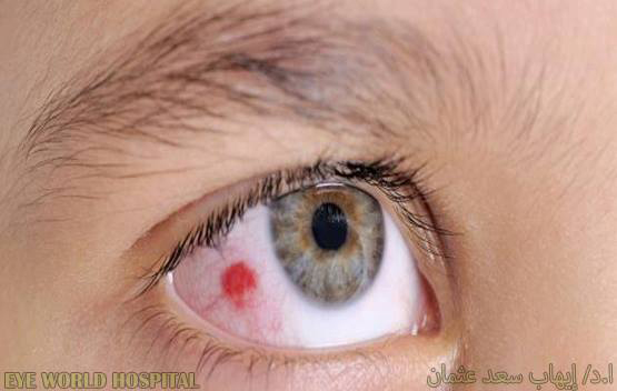 أورام العيون